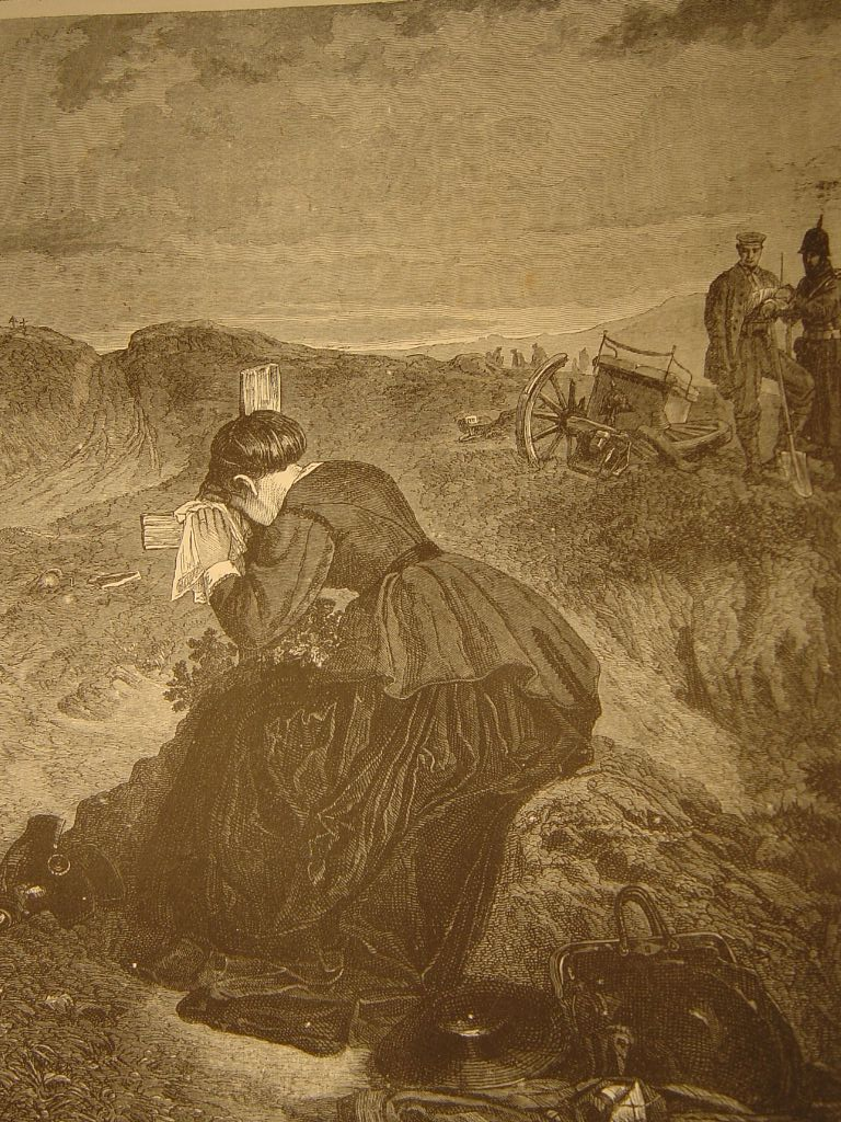 la veuve éplorée